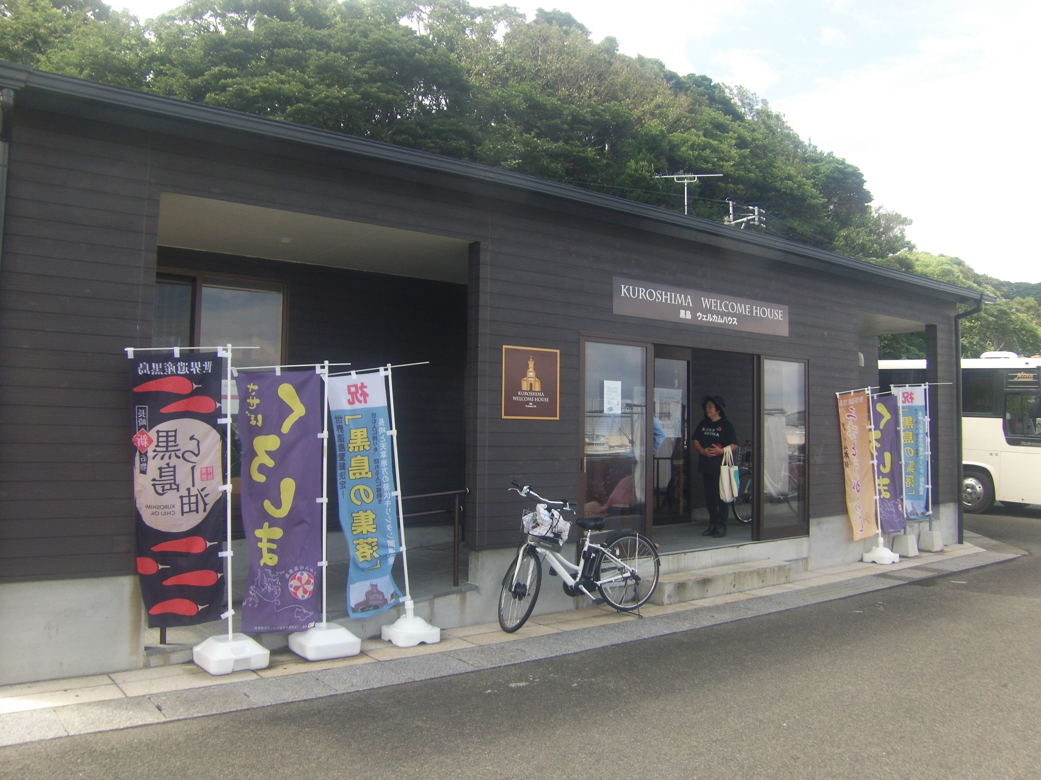 長崎県佐世保市黒島港に整備されたウエルカムハウス、土産物がありレンタサイクルも借りられる